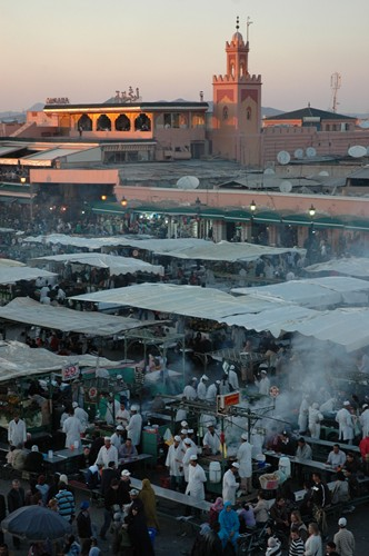 Djemà-el-Fna de nit